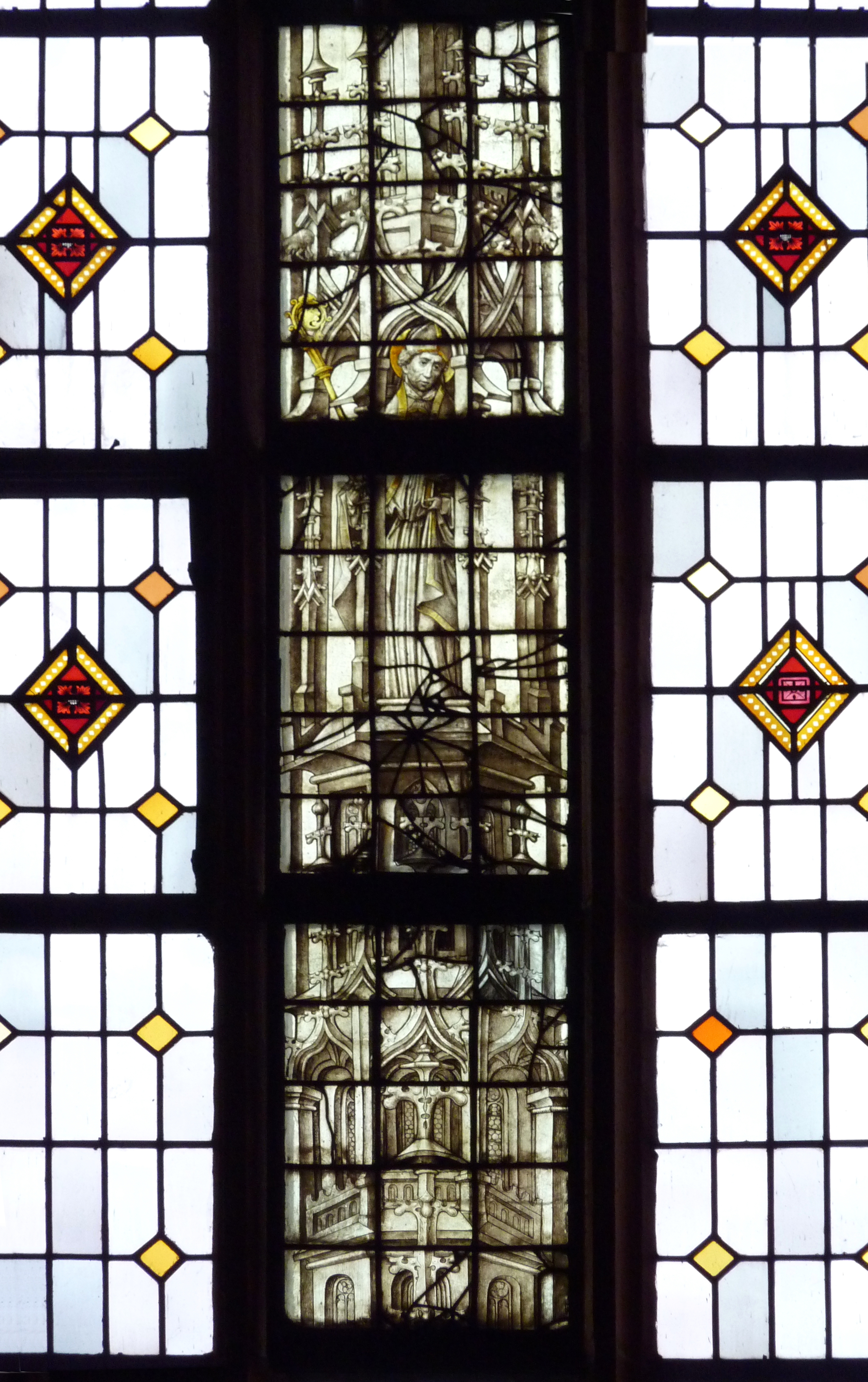 Katholische Kirche, ehemalige Klosterkirche St. Georg in Niederwerth im Landkreis Mayen-Koblenz (Rheinland-Pfalz), Bernhardfenster, Grisaillefenster von 1480, Darstellung: Bernhard von Clairvaux